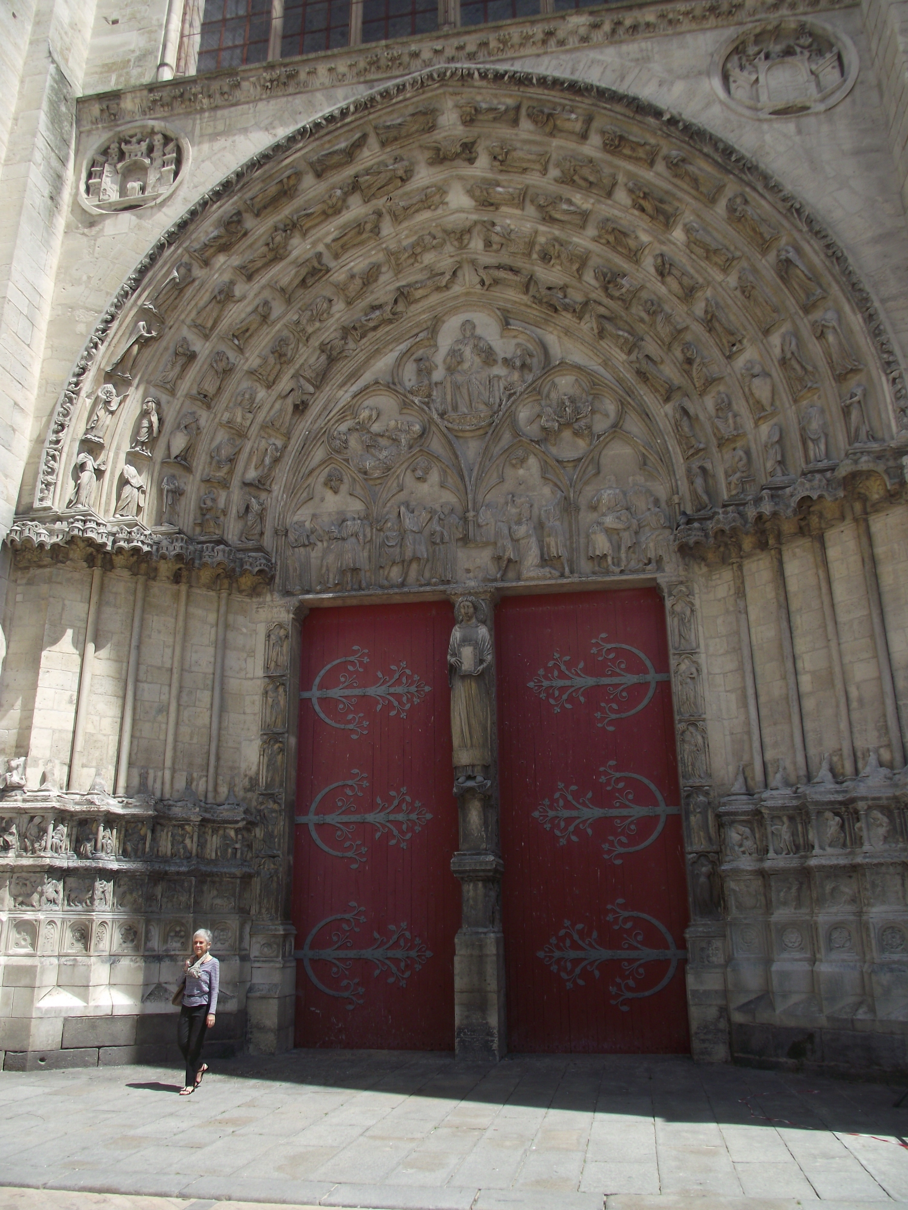 Sens, Facciata della Cattedrale di Santo Stefano, Portale centrale